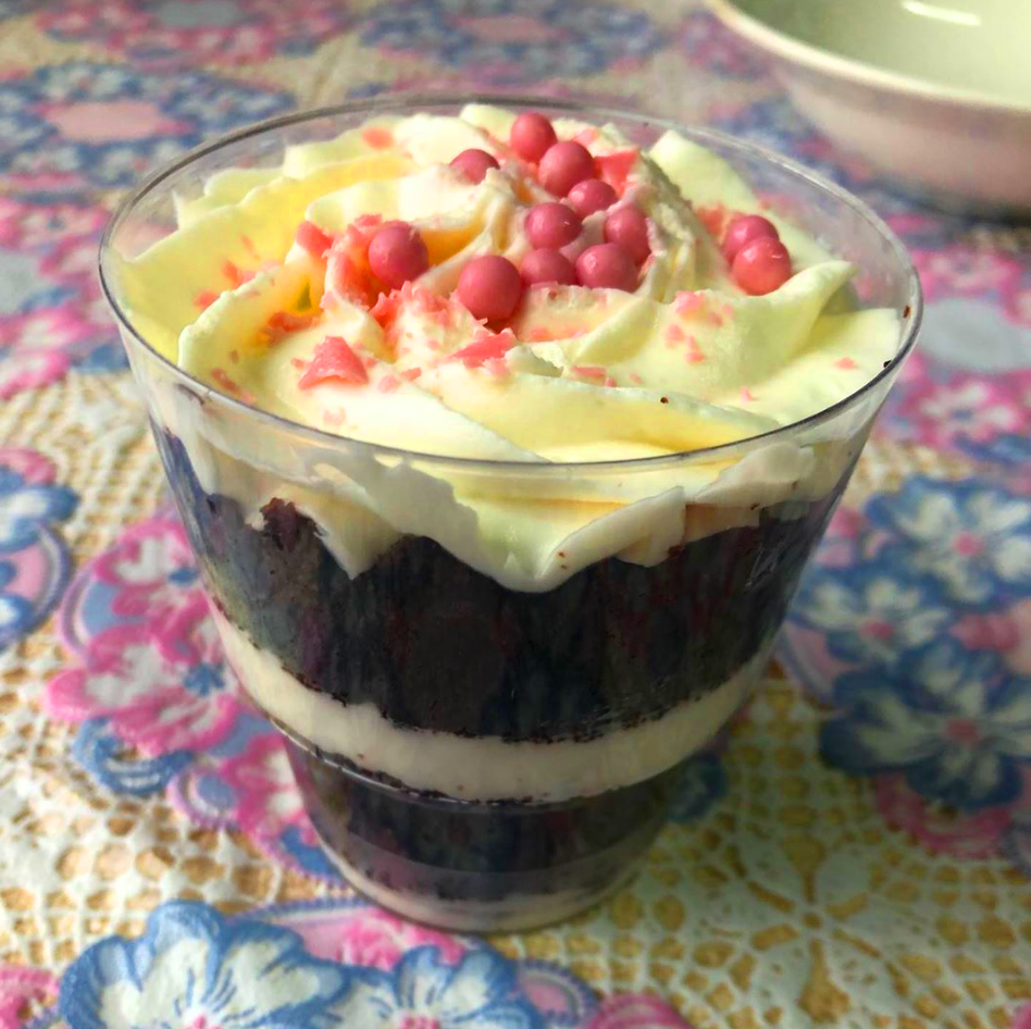 Sponge Cake